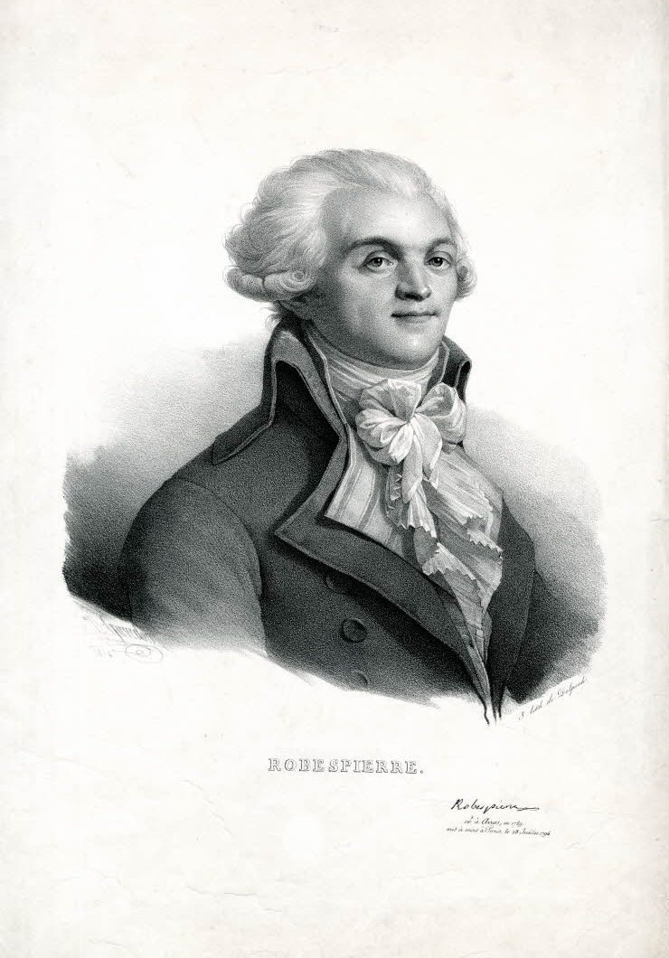 Maximilien de Robespierre. Lithographie de François Séraphin Delpech, reproduite par Henri Grevedon.